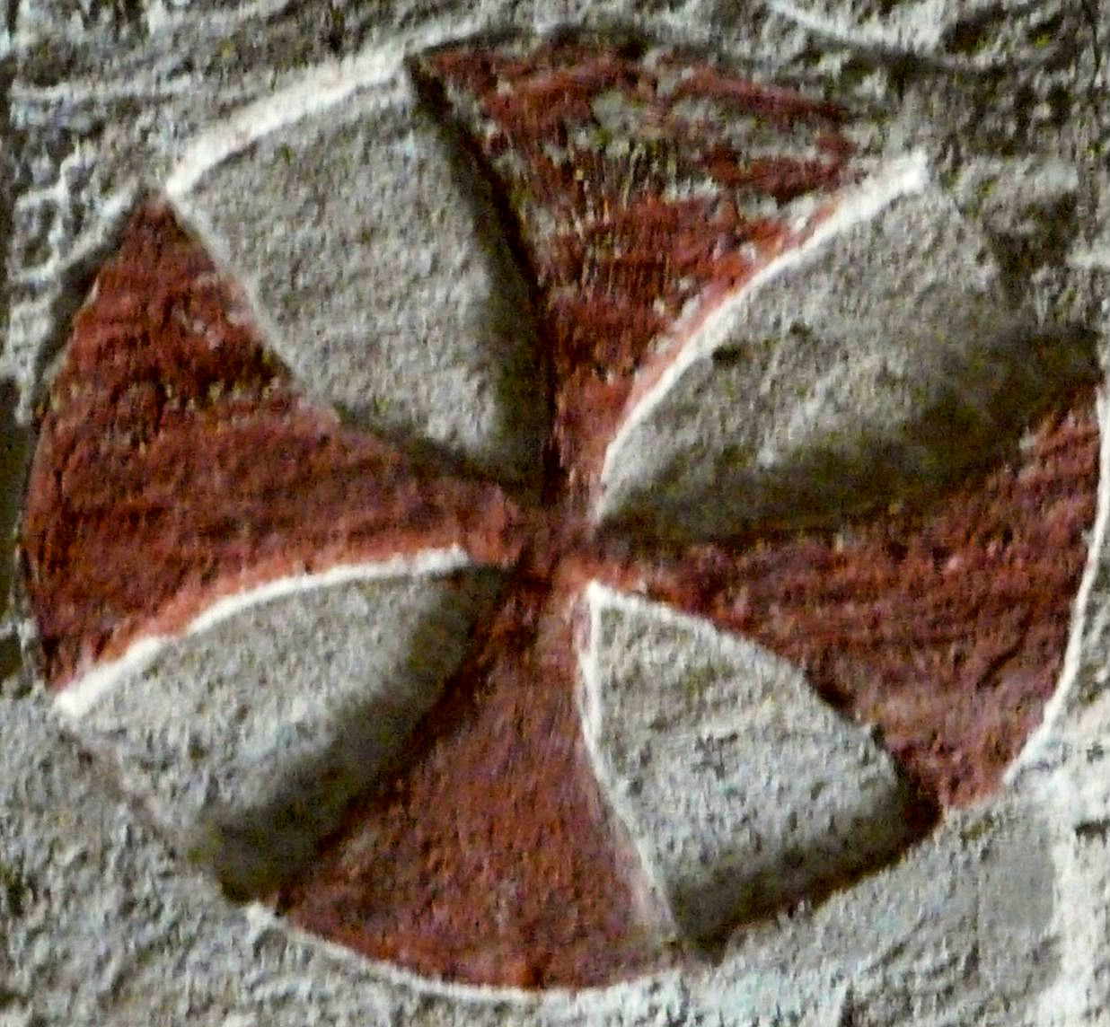 Croix de consécration dans l'église Saint-Vaast, Villac, Dordogne, France. (Cropped version)